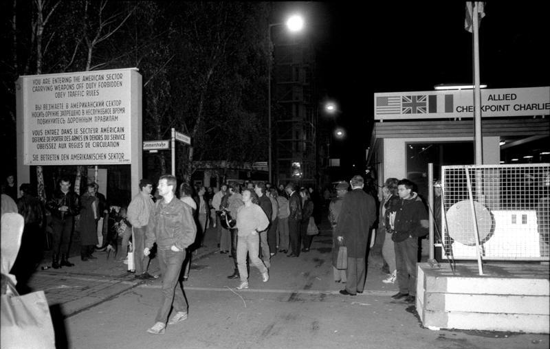 ADN-ZB-Oberst-10.11.89/ Berlin: Grenze/ Nach der Veröffentlichung der neuen Reiseregelungen herrschte in der Nacht zum 10.11. an den Grenzübergangsstellen zu Berlin (West) ein reger Besucherverkehr. Die Abfertigung durch Angehörige der Grenztruppen der DDR und des Zolls am Übergang in der Friedrichstraße erfolgte freundlich, reibungslos und unkompliziert.